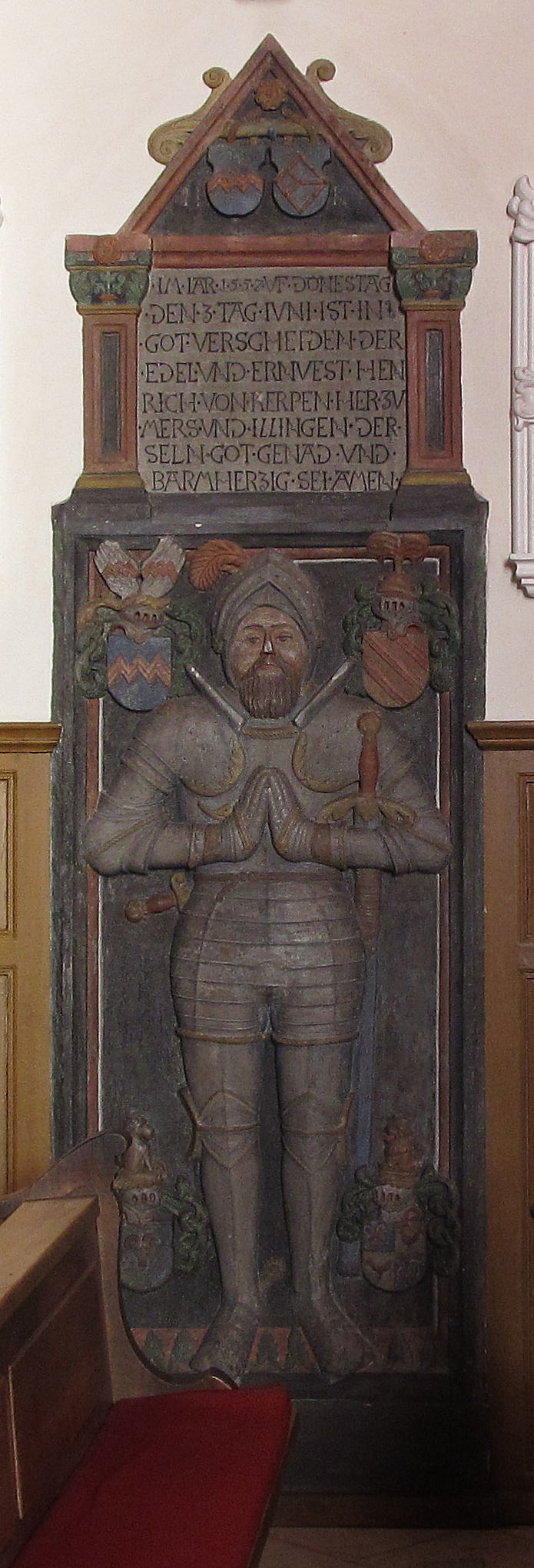 Grabmal des Heinrich von Kerpen in der katholischen Pfarrkirche St. Stephan in Illingen, Saarland